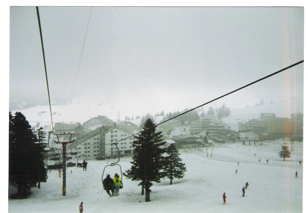 Bireysel Çalışma.(Kendim Çektim.)